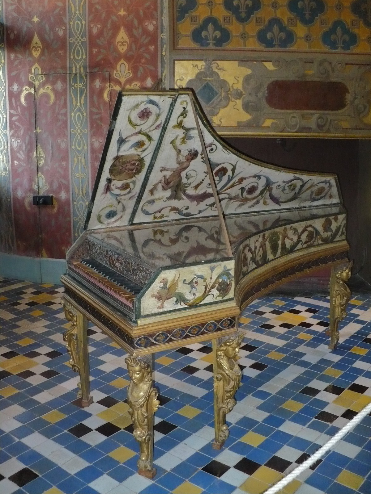 Giovanni Antonio Baffo: Clavecin (1572), remanié par Leopoldo Francioloni au XIXe siècle - don de Mme Baptistine Augustin-Thierry; galerie de la reine, intérieur du Château de Blois, France.